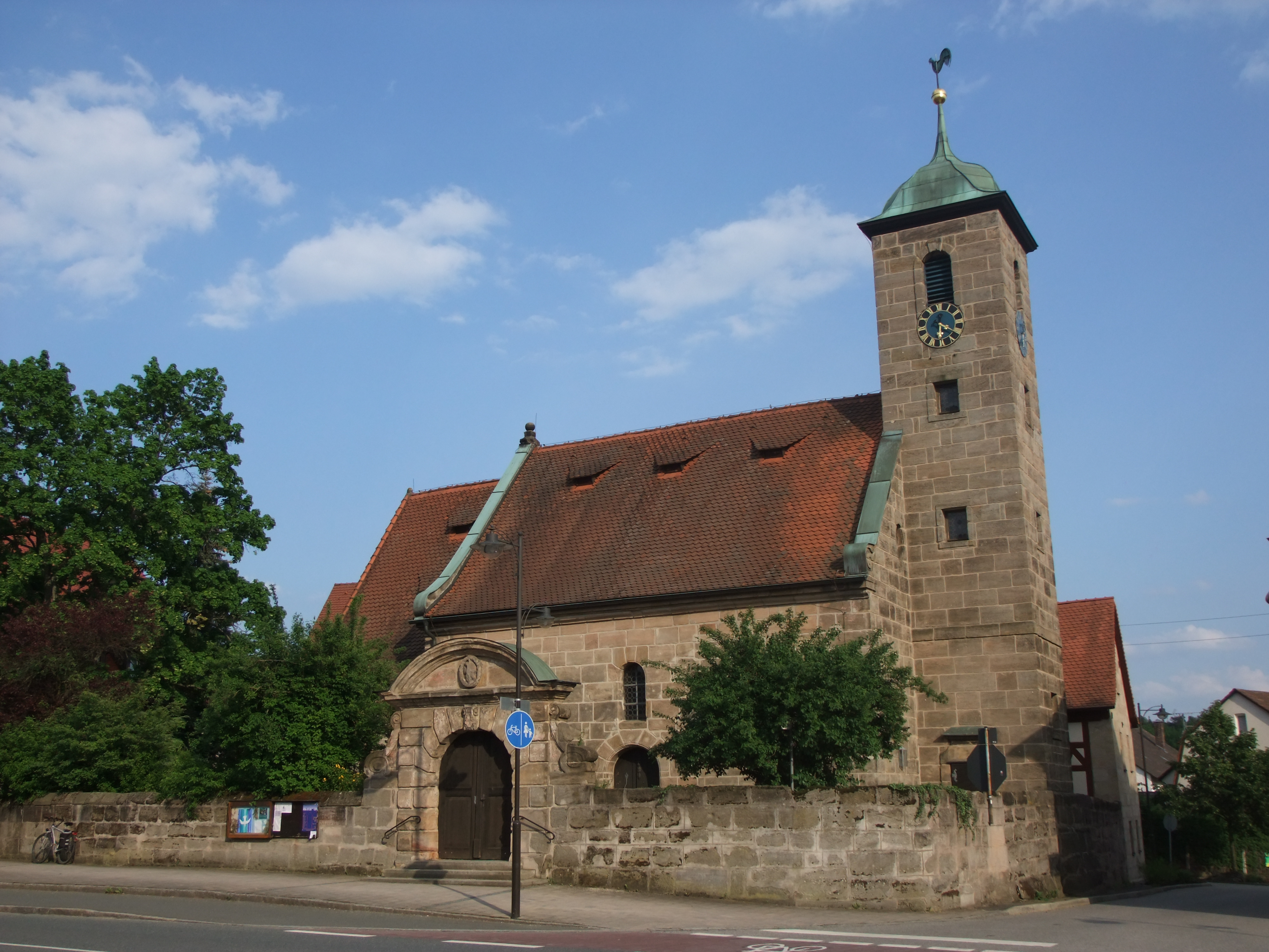 Ev. St. Georgs Kirche in Rückersdorf bei Nürnberg